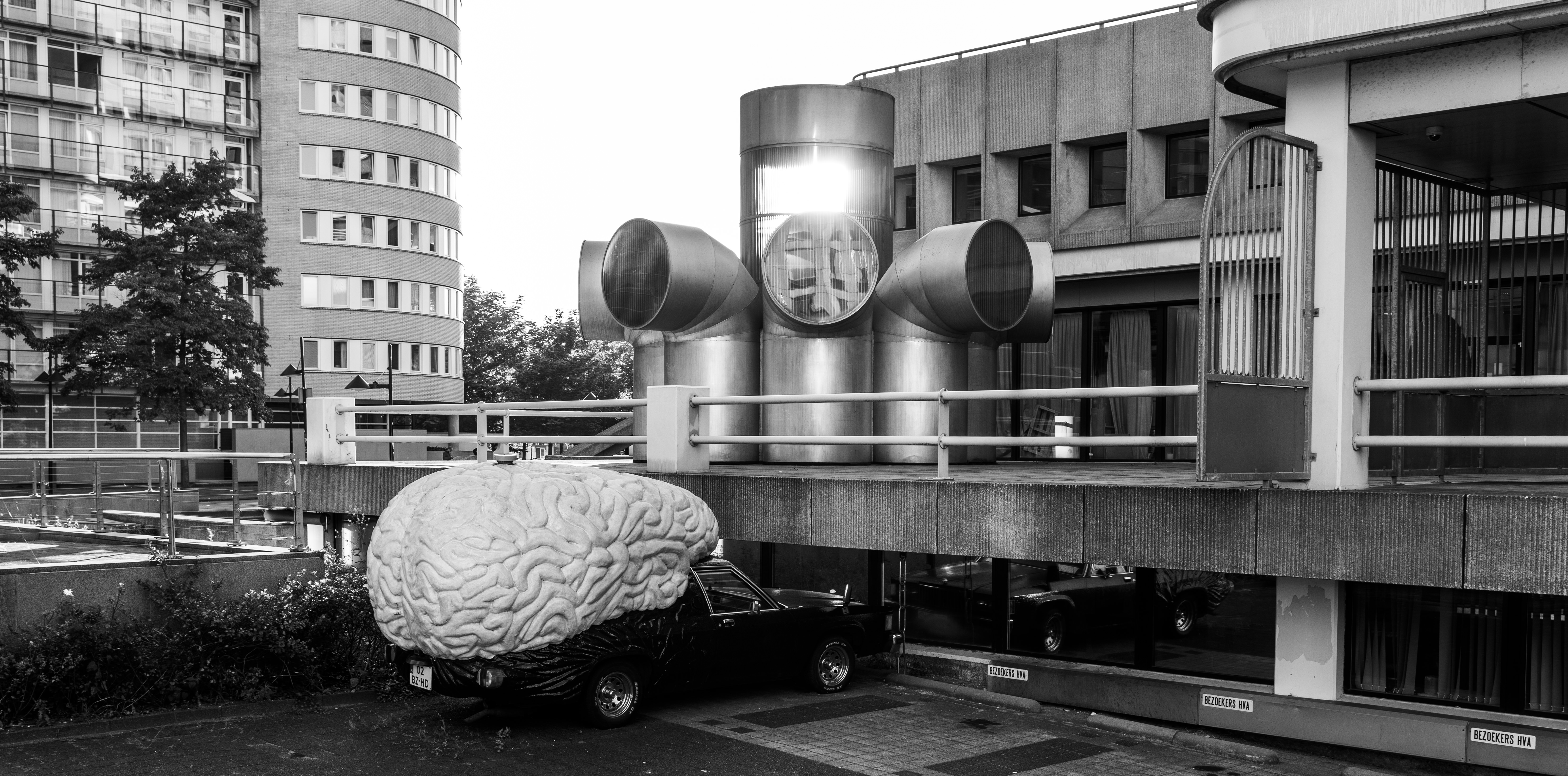 2018 Braincar Olaf Mooij Amsterdam